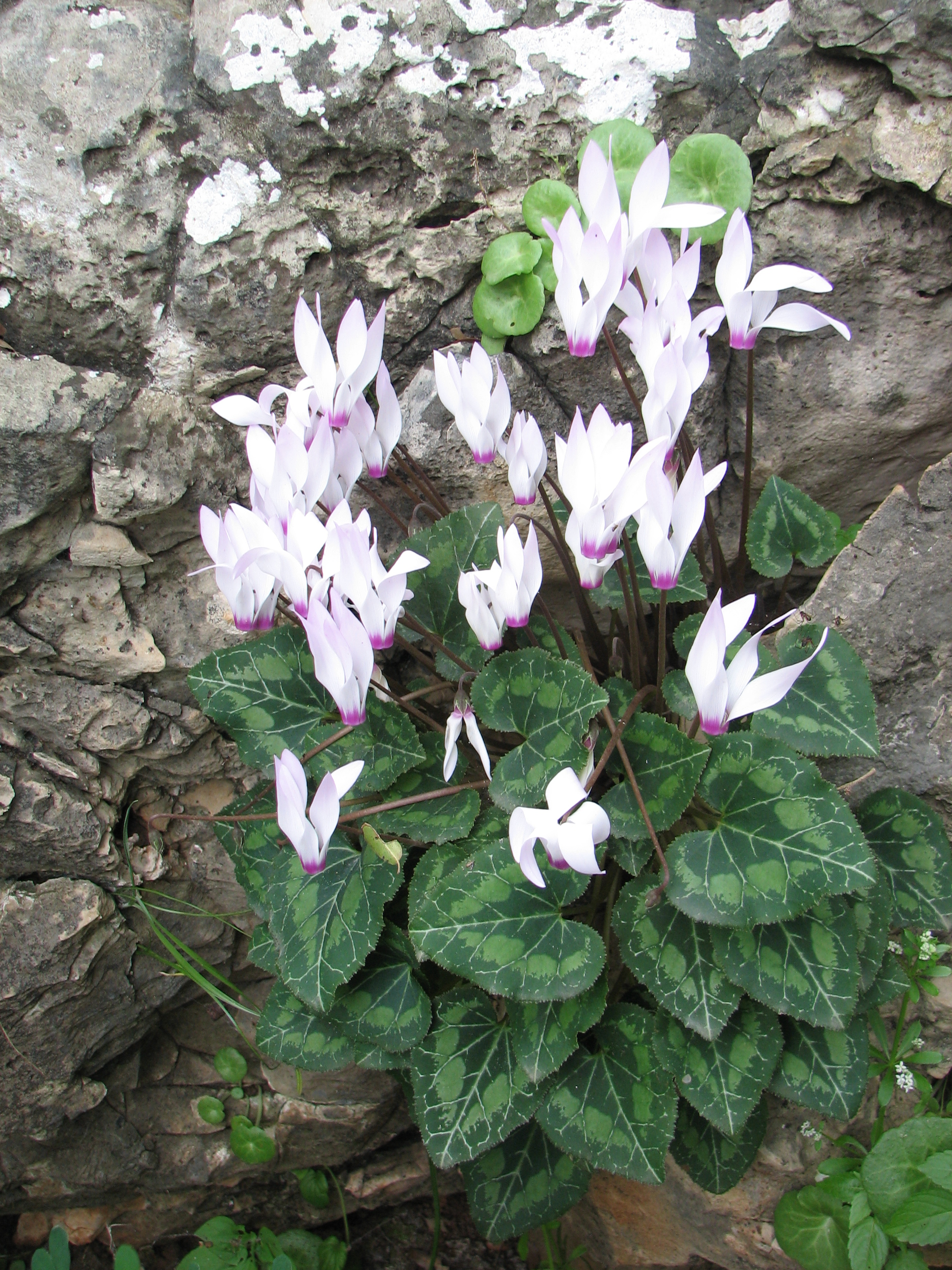 Green Paths, between Nesher - Yagur on Mount Carmel Israel. View from the path השביל הירוק בין העיר נשר וקיבוץ יגור, על הצלע הצפונית של הר הכרמל. מראות על השביל רקפת מצויה